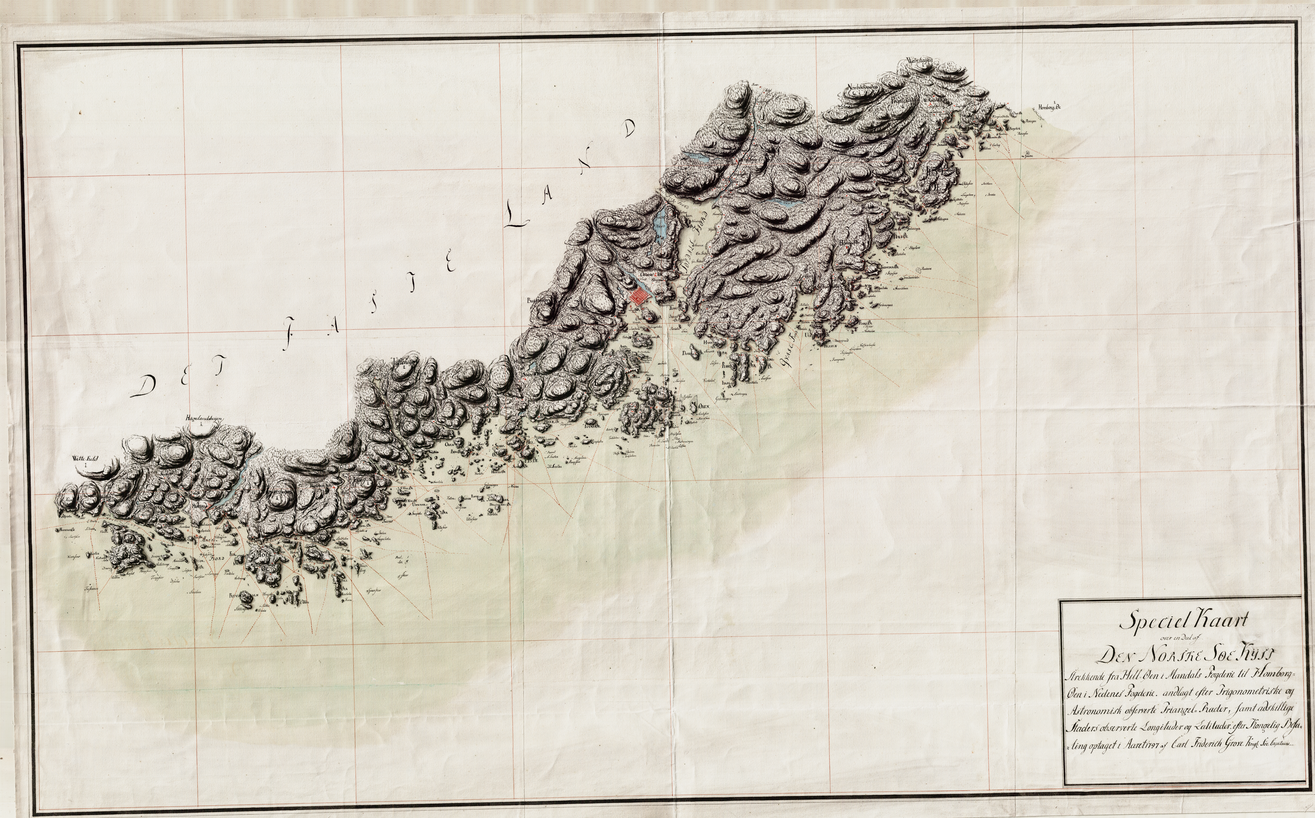 Sjøkart over kysten utenfor sørlandet, fra Hille til Lillesand, fra 1797. Håndtegnet av Carl Friderich Grove i ukjent målestokk. Original kartstørrelse ca 132 x 82 cm. Et eksemplar befinner seg hos Statens kartverk Sjø i Stavanger.